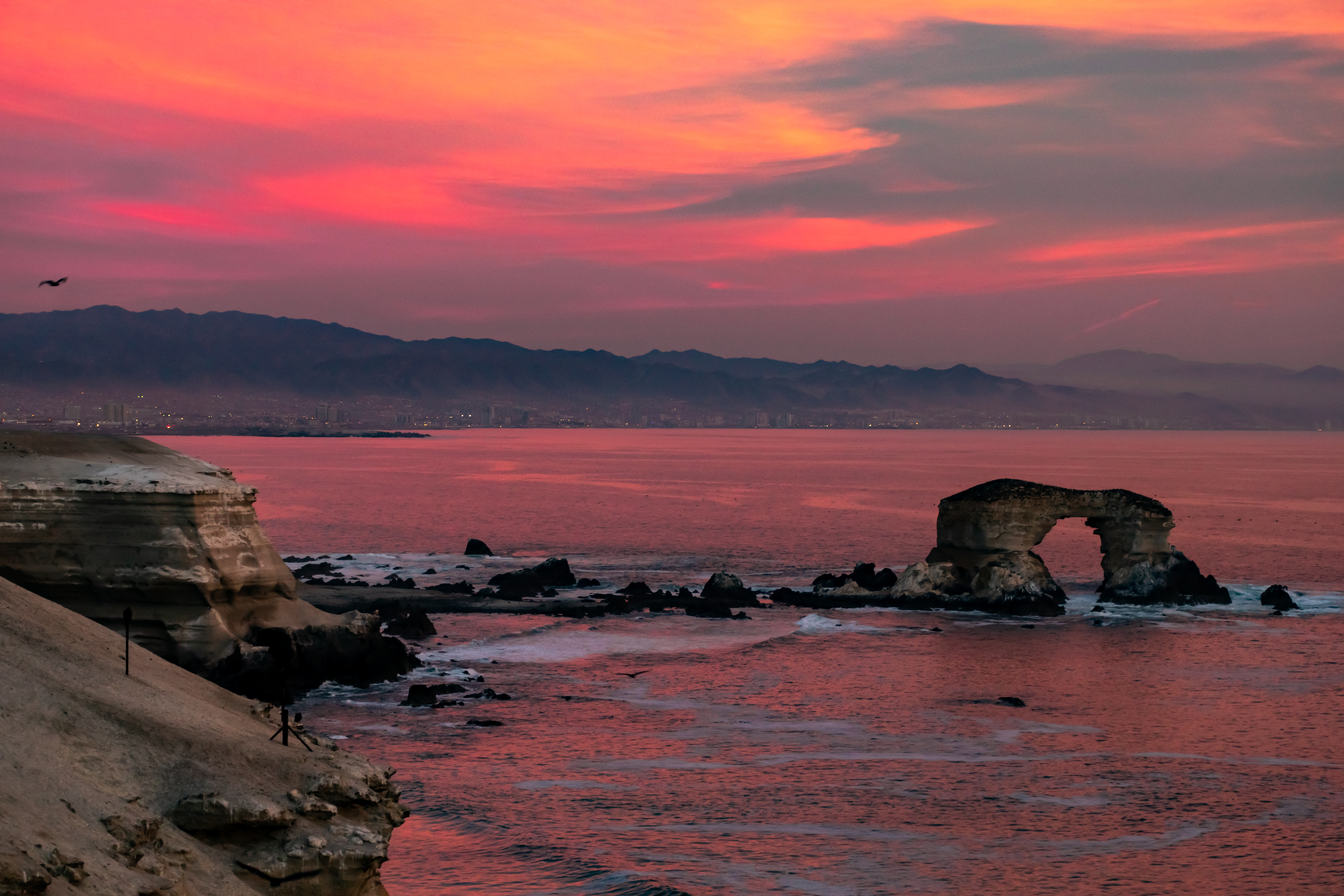 Atardecer en elMonumento natural La Portada, efecto producido por la dispersión de Rayleigh